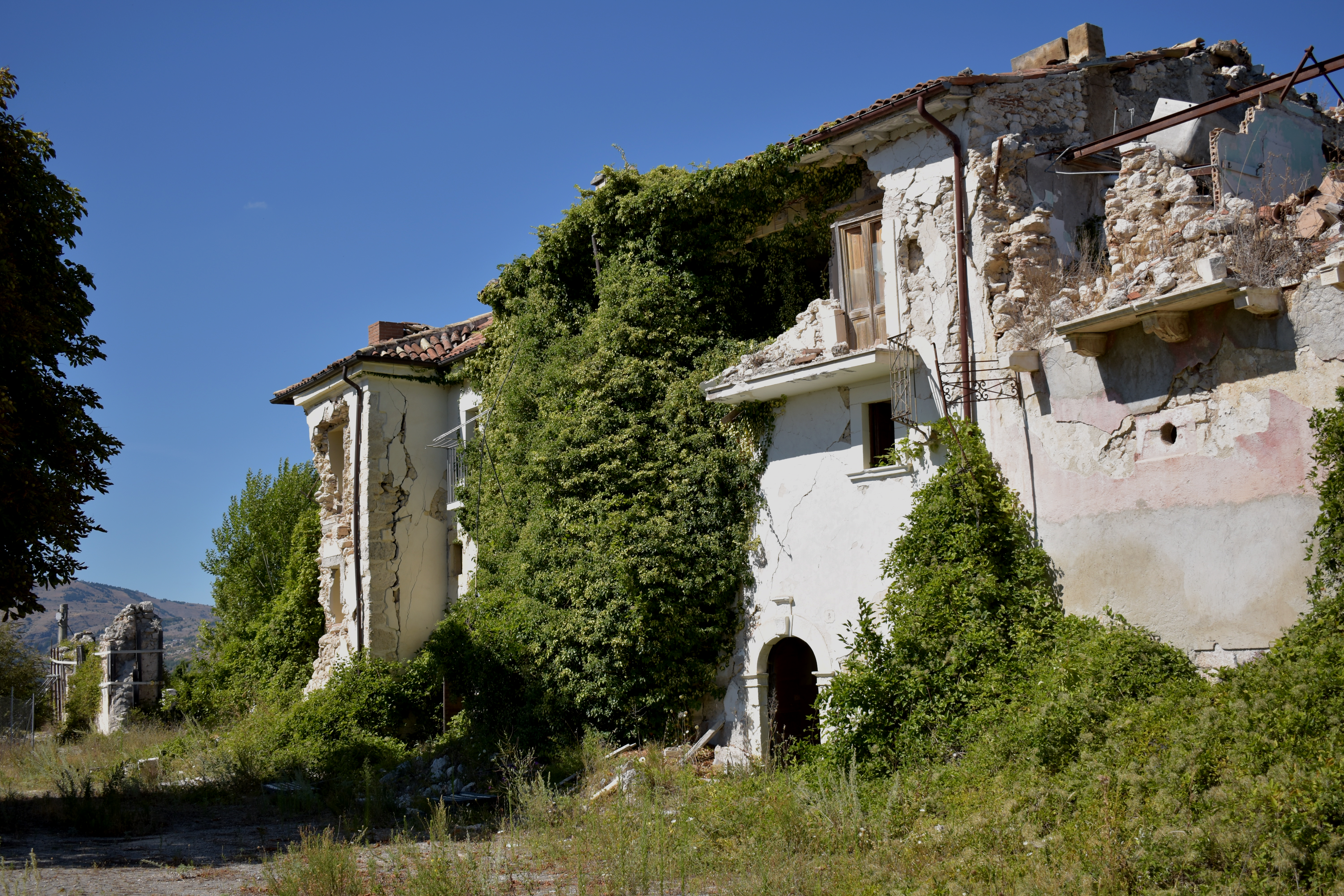 Borgo fortificato e chiesa parrocchiale di Castelnuovo (San Pio delle Camere), dopo il terremoto dell'Aquila del 2009 (2020)